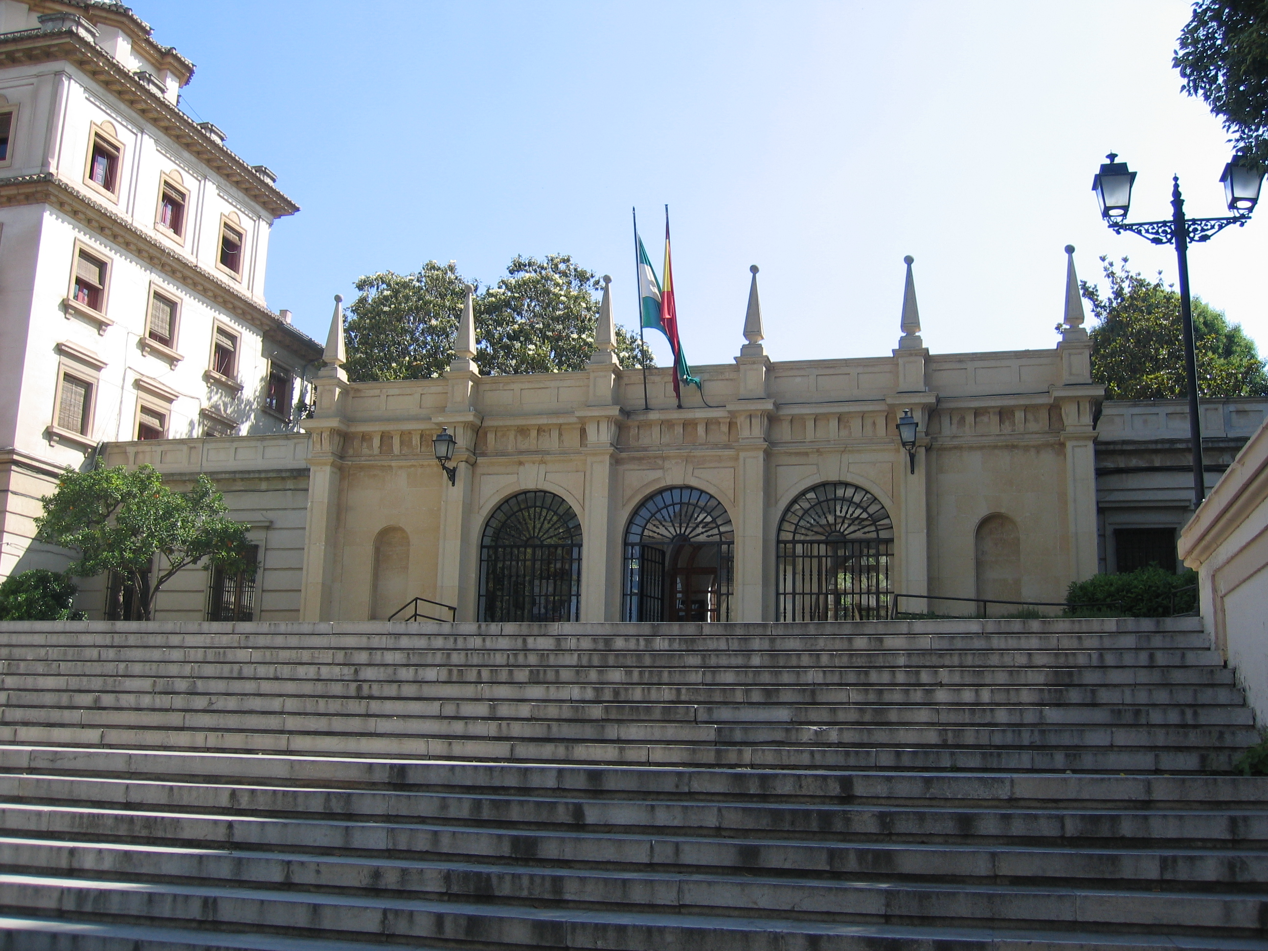 Entrada al Colegio Mayor Isabel la Católica